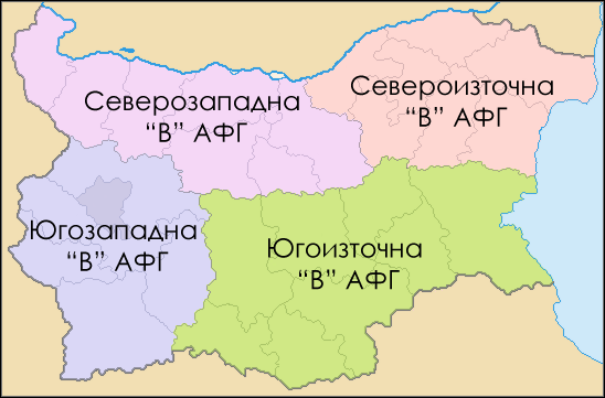 Карта на разпределението на групите във "В" Аматьорскита футболна група